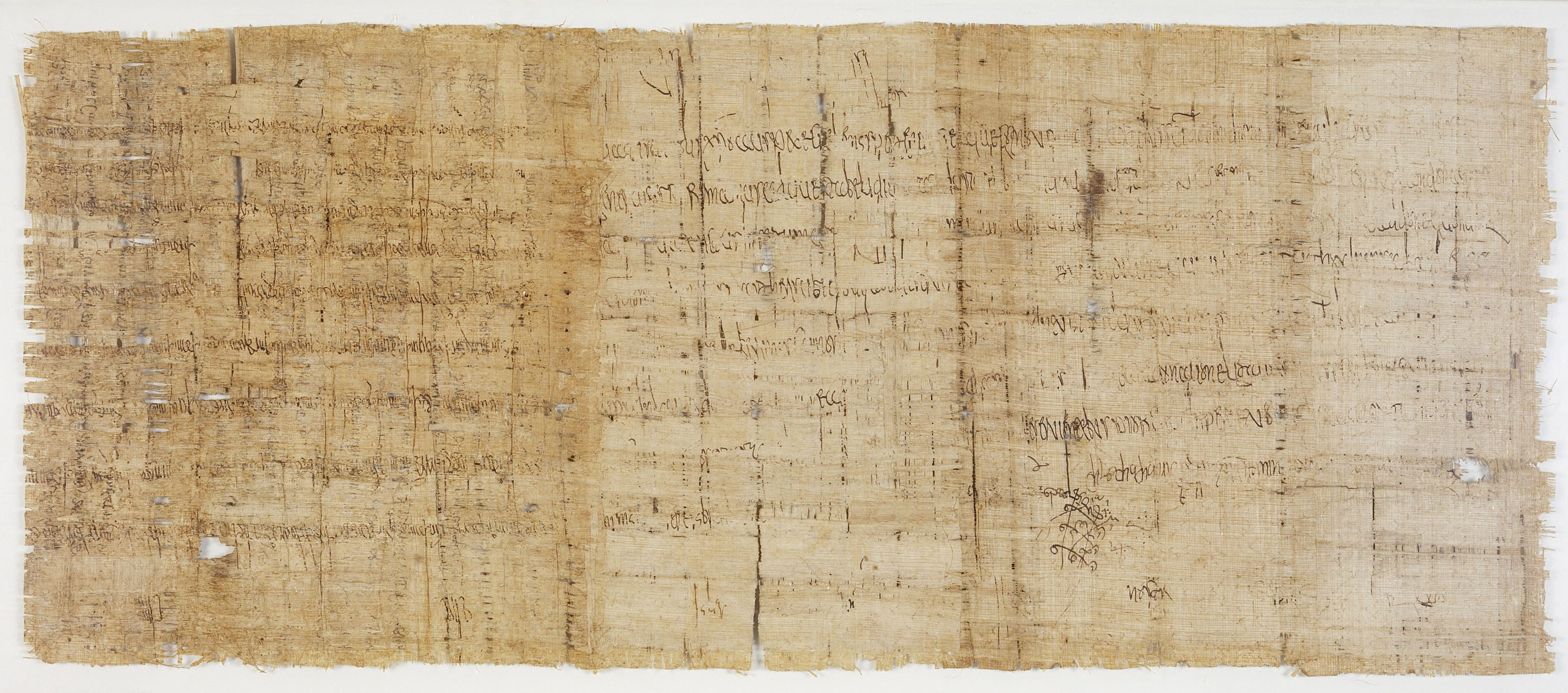 Confirmation par Clotaire II d'une donation faite à l'abbaye de Saint-Denis par un certain Dagobert